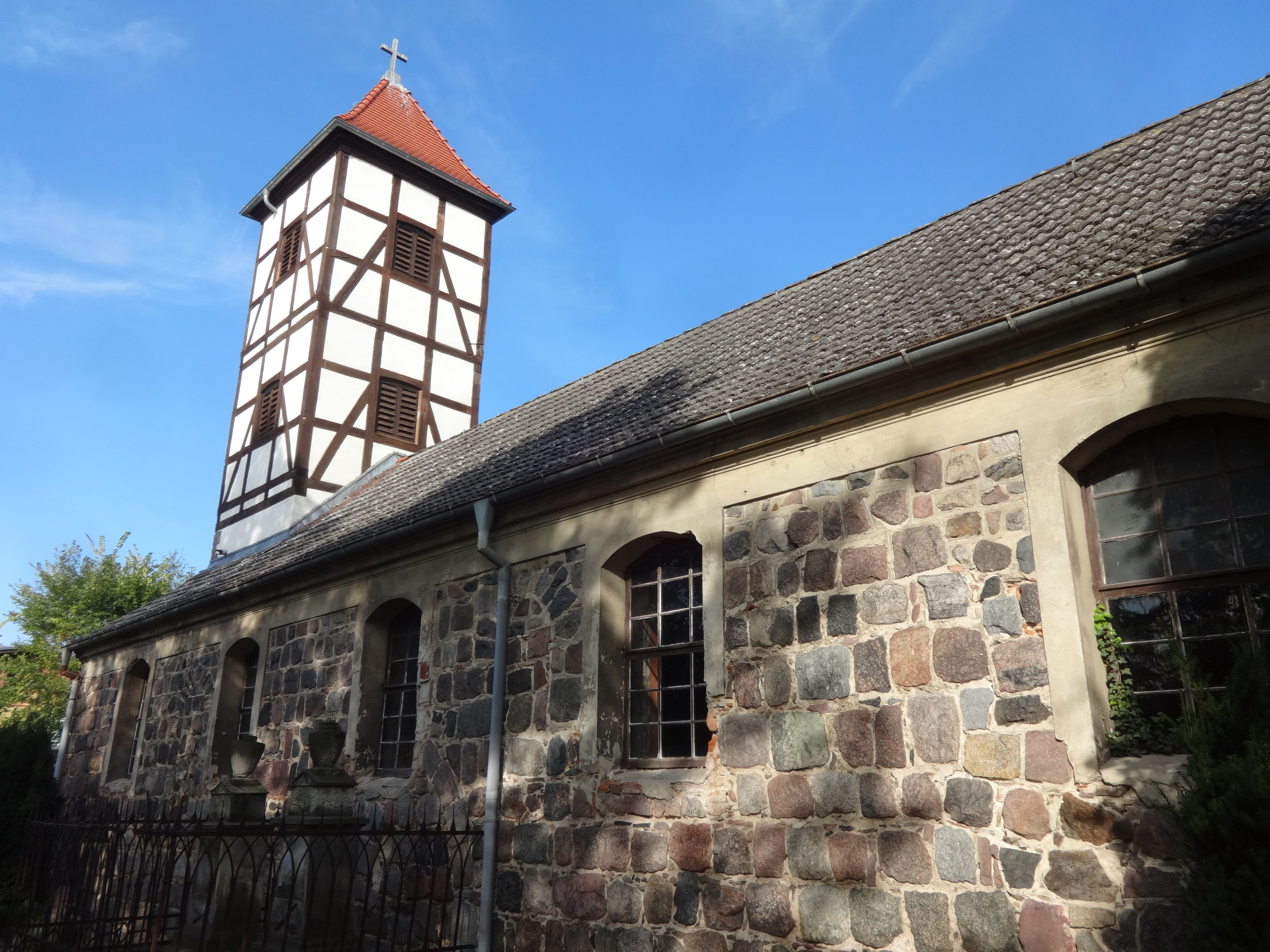 Die Dorfkirche in Schenkenhorst ist eine Feldsteinkirche aus dem Ende des 13. Jahrhundert. Sie wurde vermutlich im 16. Jahrhundert nach Osten hin verlängert. Vor der südlichen Wand des Kirchenschiffs ist eine Urnengrabstätte der Familie von Treplin. Der Innenraum ist von einer Renovierung in den Jahren 1911 und 1912 geprägt.